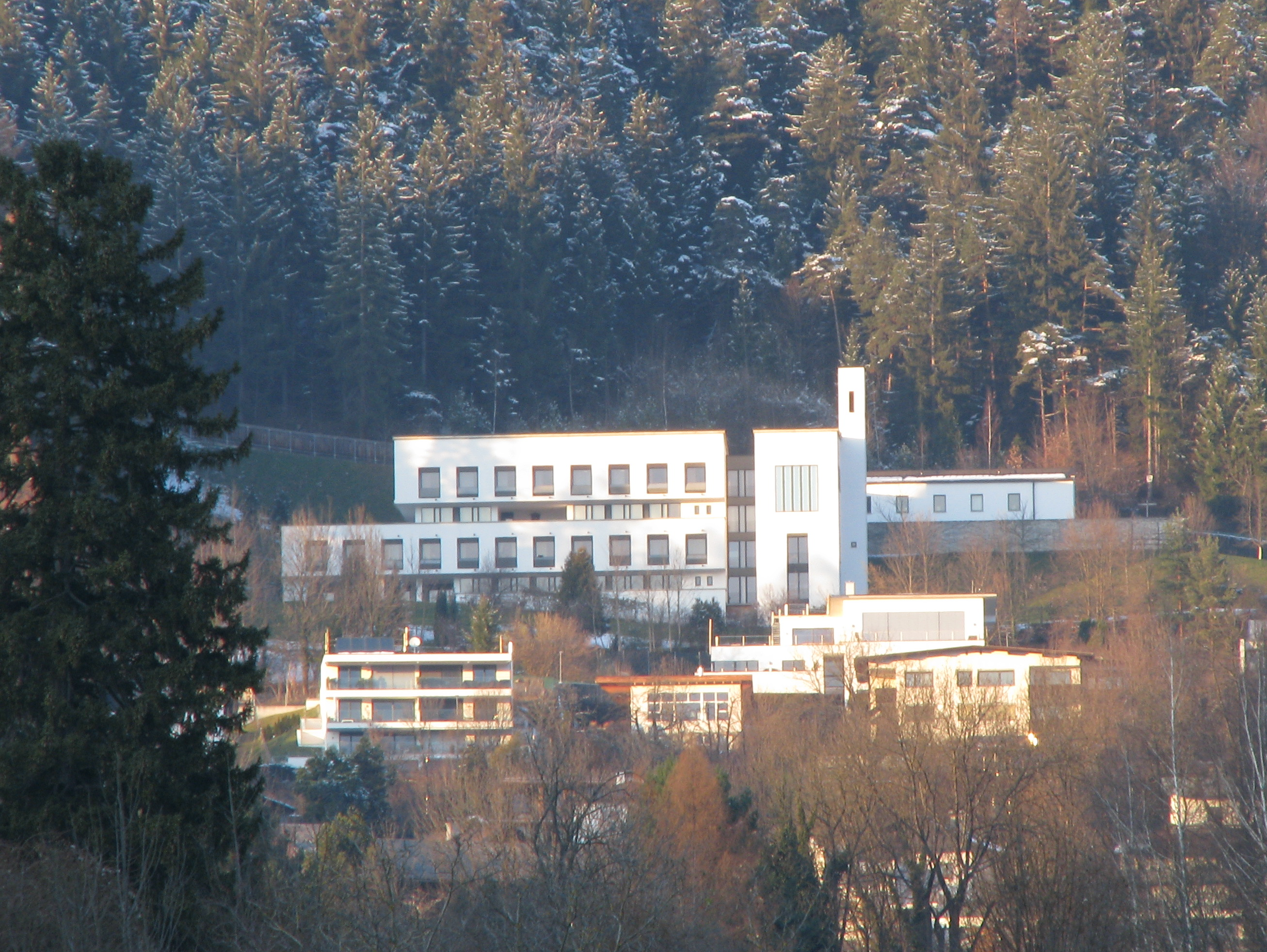 Karmel St. Josef und St. Teresa, Innsbruck This media shows the remarkable cultural object in the Austrian state of Tyrol listed by the Tyrolean Art Cadastre with the ID 23573. (on tirisMaps, on tirisdienste.at, pdf, more images on Commons)